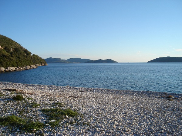 Veliki Žal beach near Dubrovnik